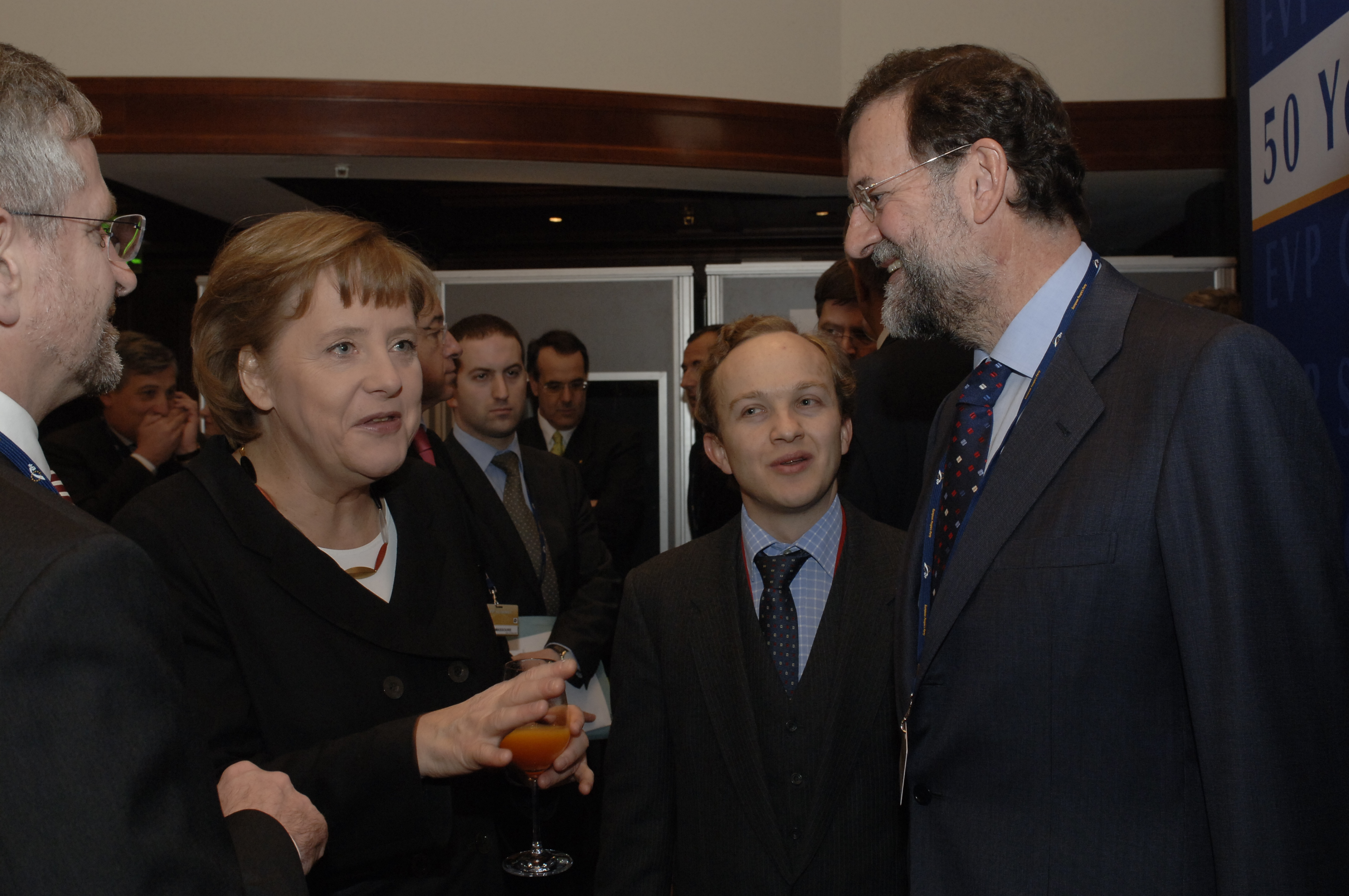 EPP Summit 24 March 2007